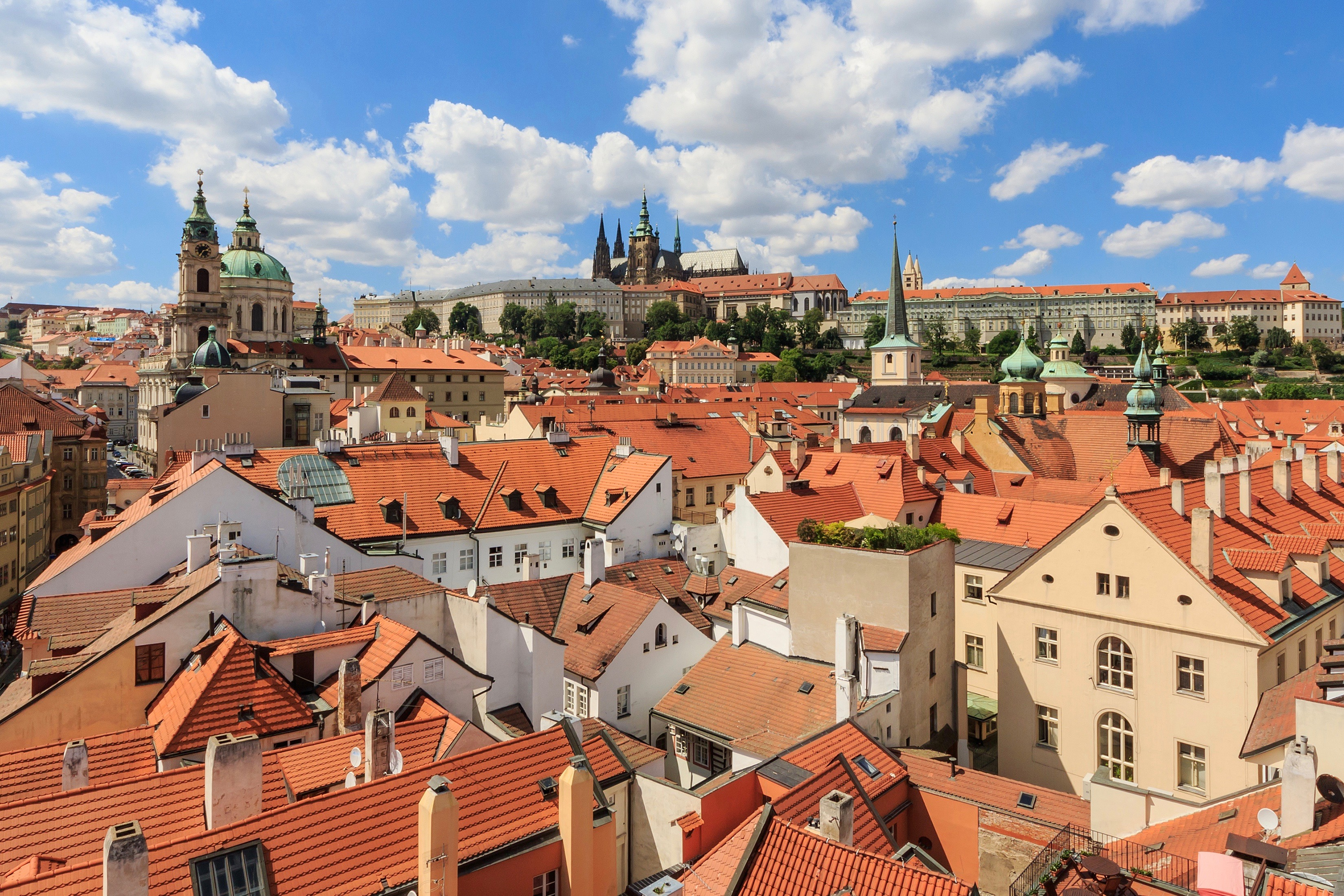 Vue de Malá Strana depuis la tour Ouest du pont Charles, avec l'Église Saint-Nicolas de Malá Strana à gauche et le château de Prague en arrière-plan.